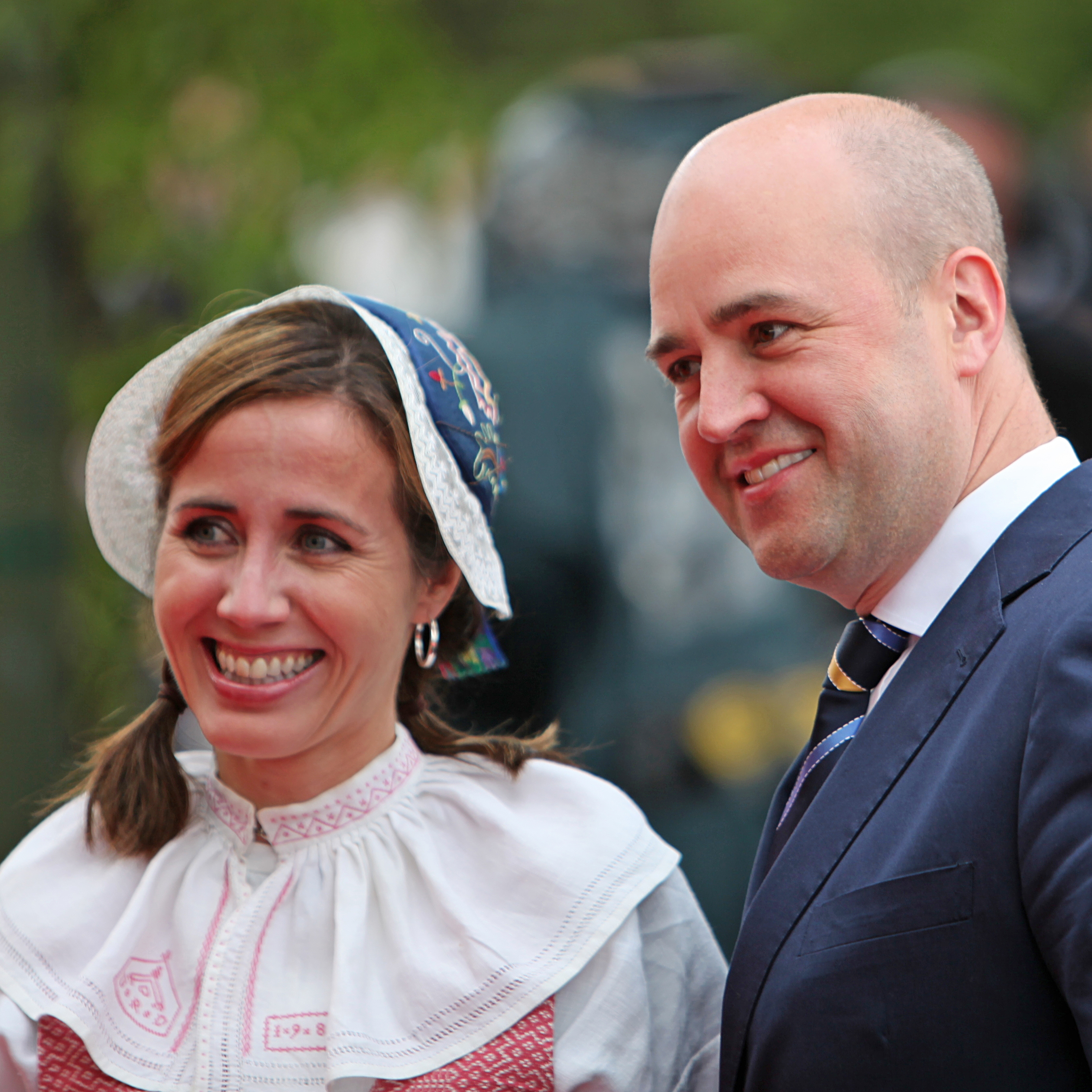 Statsminister Fredrik Reinfeldt med förtjusande fru